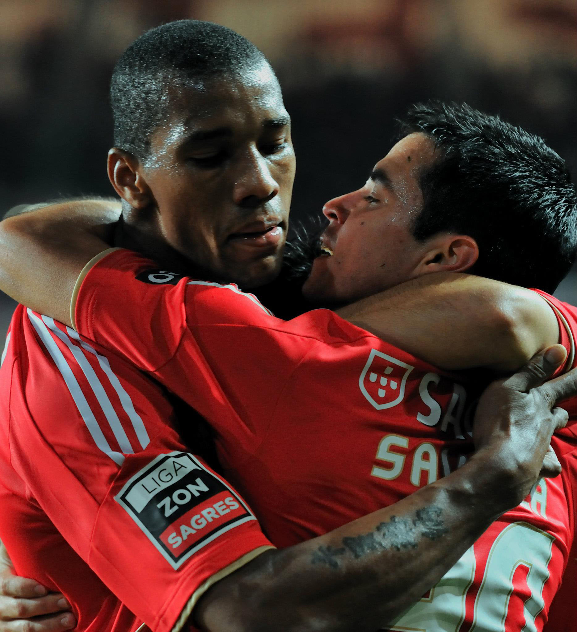 Saviola e Emerson